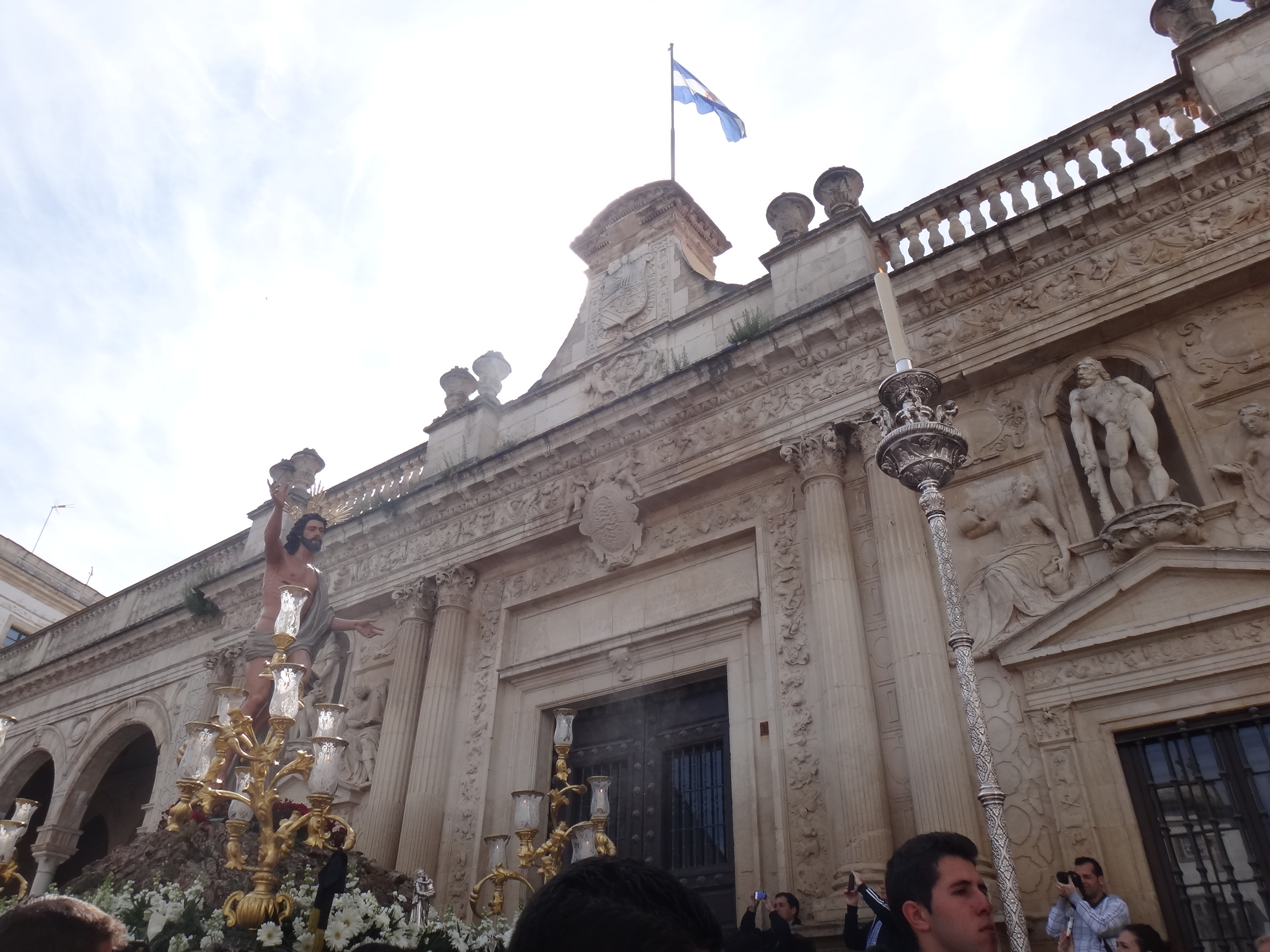 Procesión del Resucitado en Jerez de la Frontera (Andalucía, España)